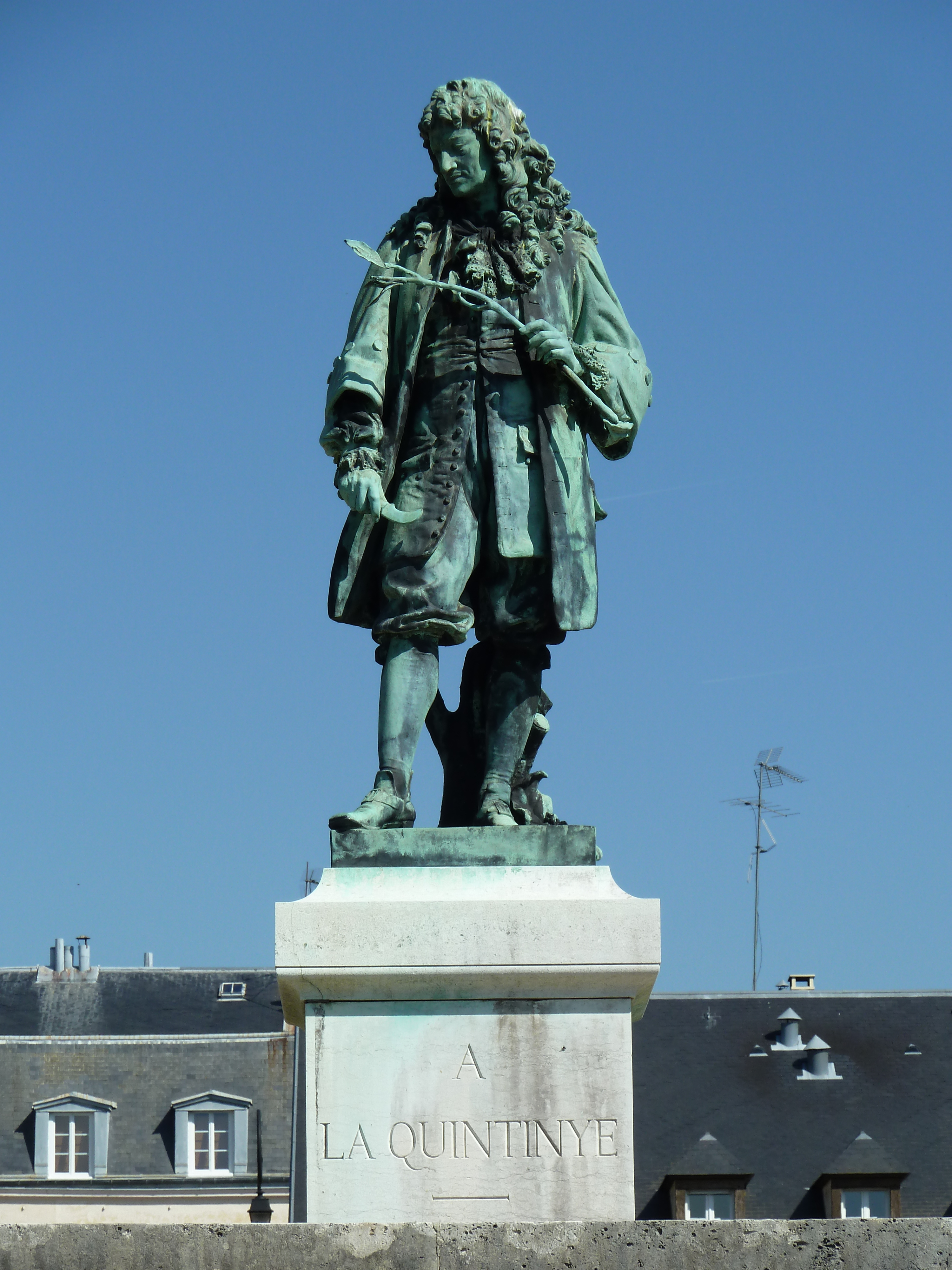 Château de Versailles, potager du roi, statue de La Quintinye